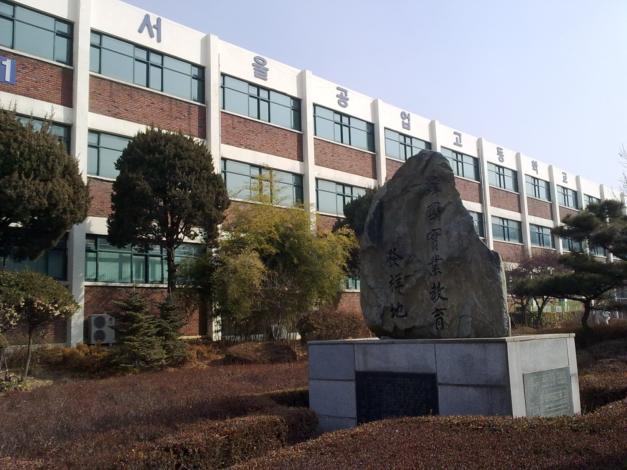 서울공업고등학교 실습동건물과 한국실업교육발상지기념탑